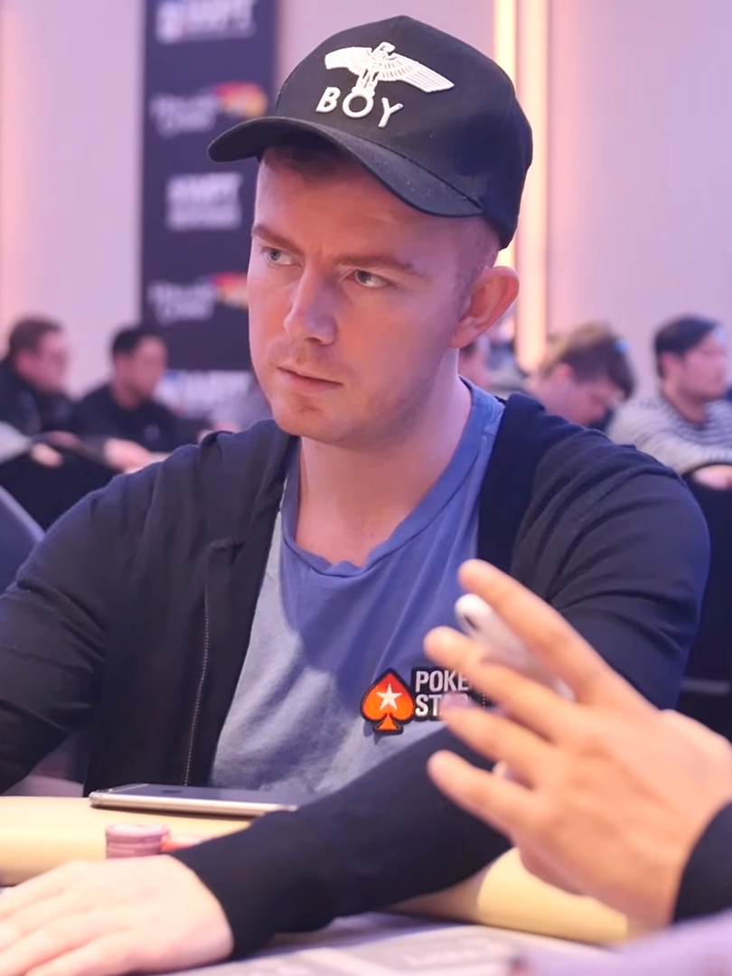 Jake Cody bei der WPT Amsterdam